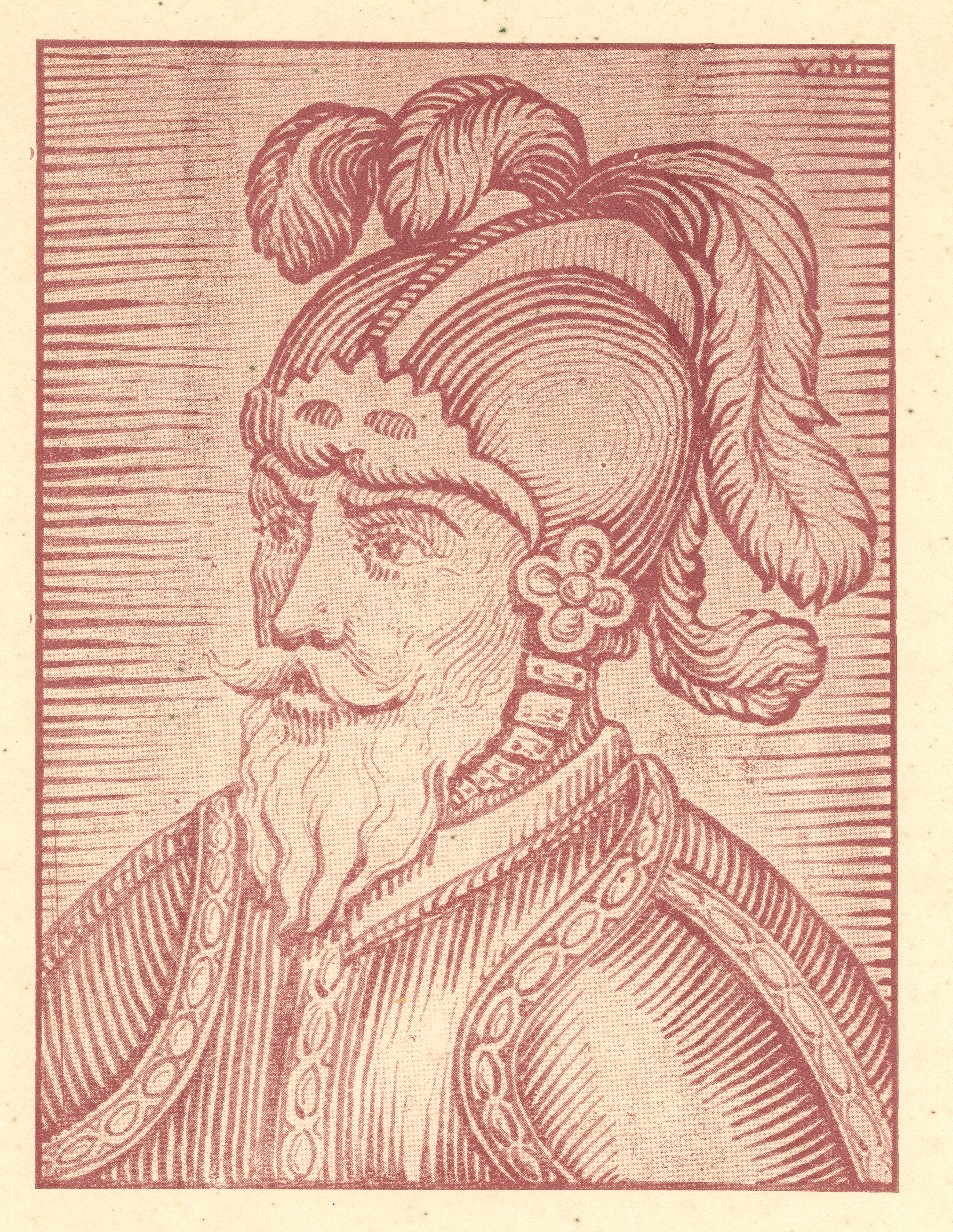 Rumazo Gonzalez, José. Libro Primero de los Cabildos de Quito Versión Descifrada por José Rumazo Gonzalez Tomo I (1534 a 1539). Publicaciones del Archivo Municipal de Quito. A 1 de Enero Año 1934 Quito - Ecuador. .